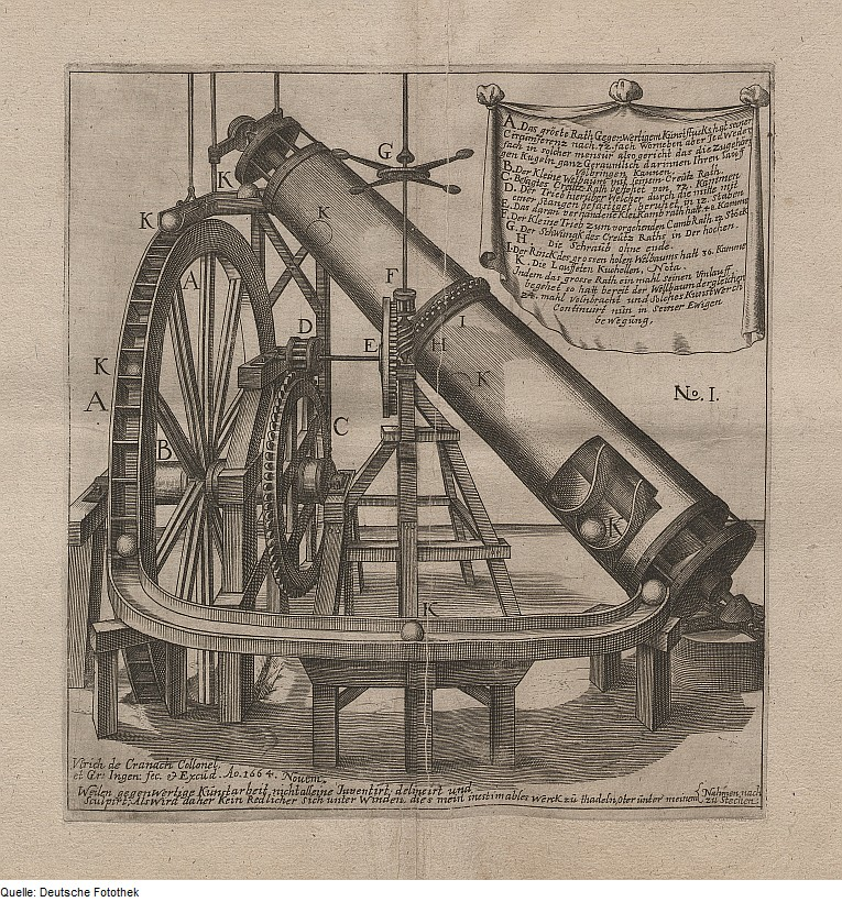 Original image description from the Deutsche Fotothek Mechanik & Mühle & Rad